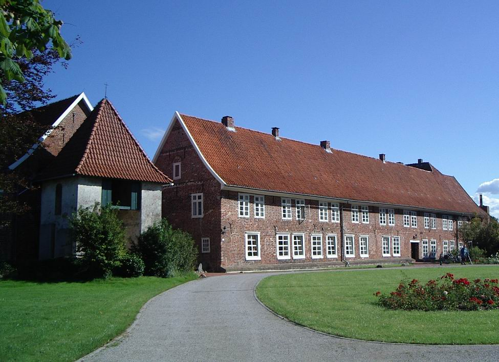 Das Damenstift Kloster Neuenwalde, Stadt Langen, links die Heilig-Kreuz-Kirche mit Turm, rechts ein Conventsgebäude des Damenstifts. Foto von Benutzer:Geoz 2005